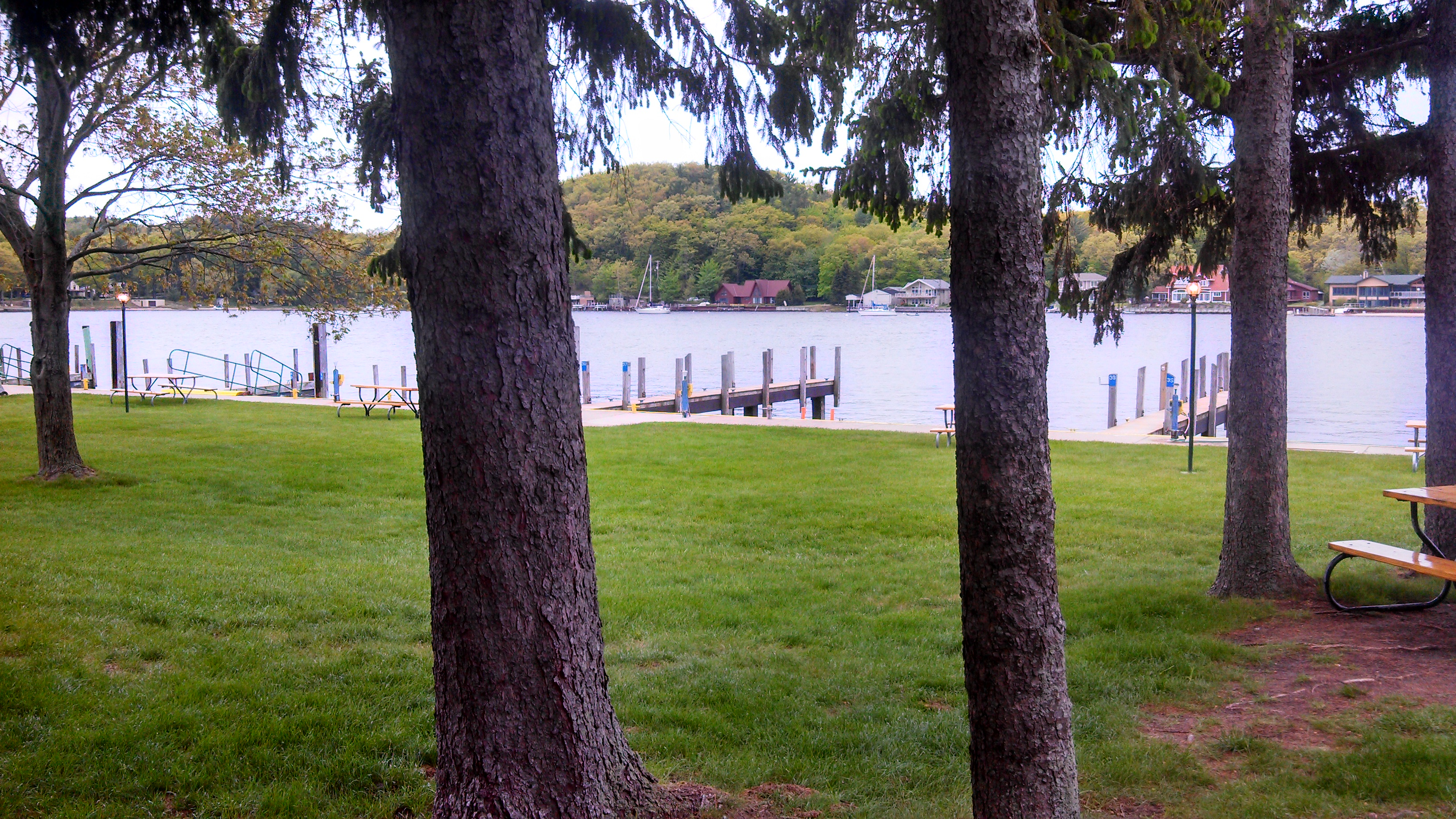 Pentwater, MI 49449, USA